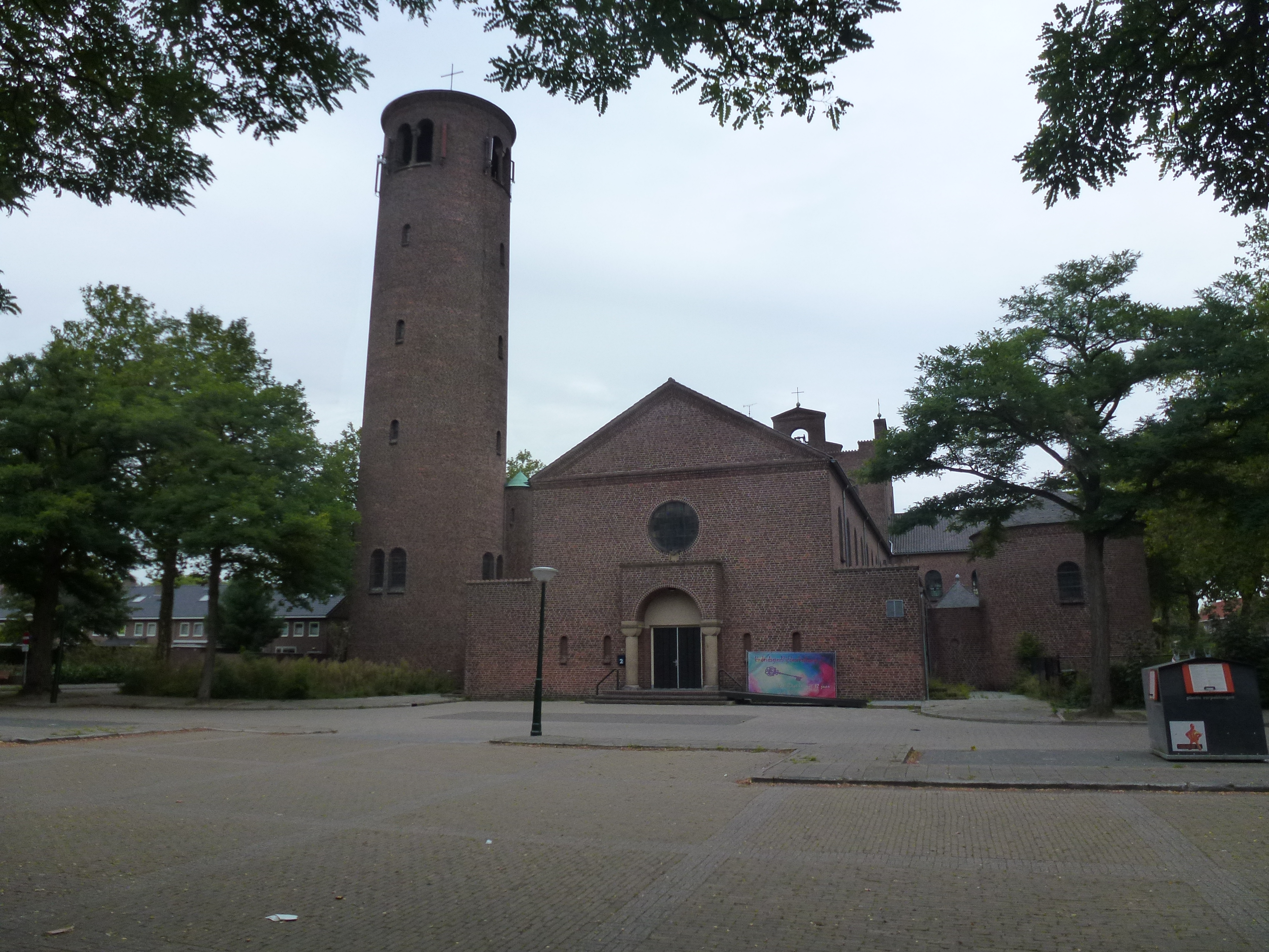 Voormalige Don Boscokerk Mimosaplein Eindhoven